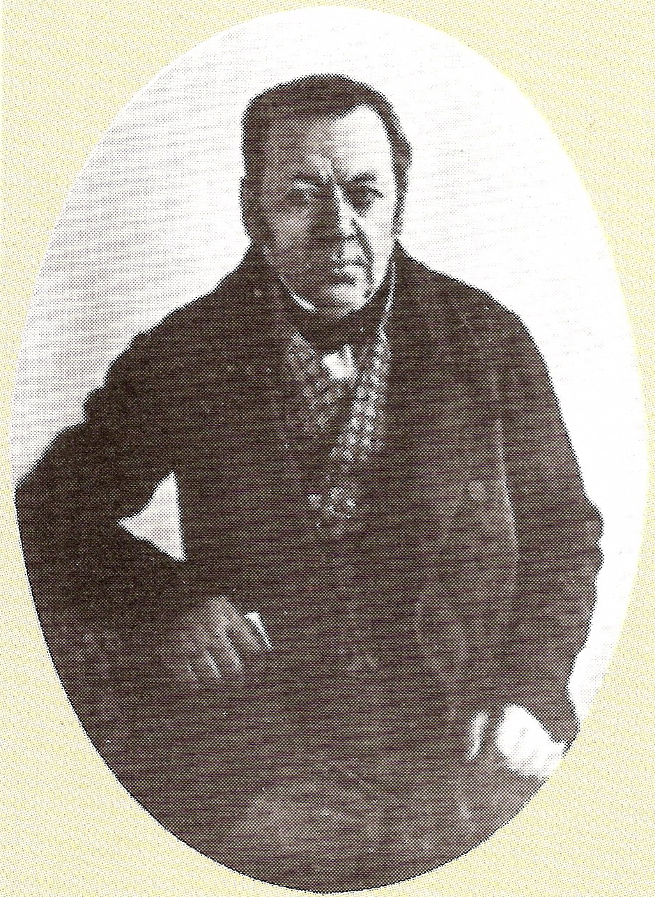 David Sprüngli (* 1776 in Andelfingen (ZH); † 14. Februar 1862 in Zürich) war ein Schweizer Chocolatier.